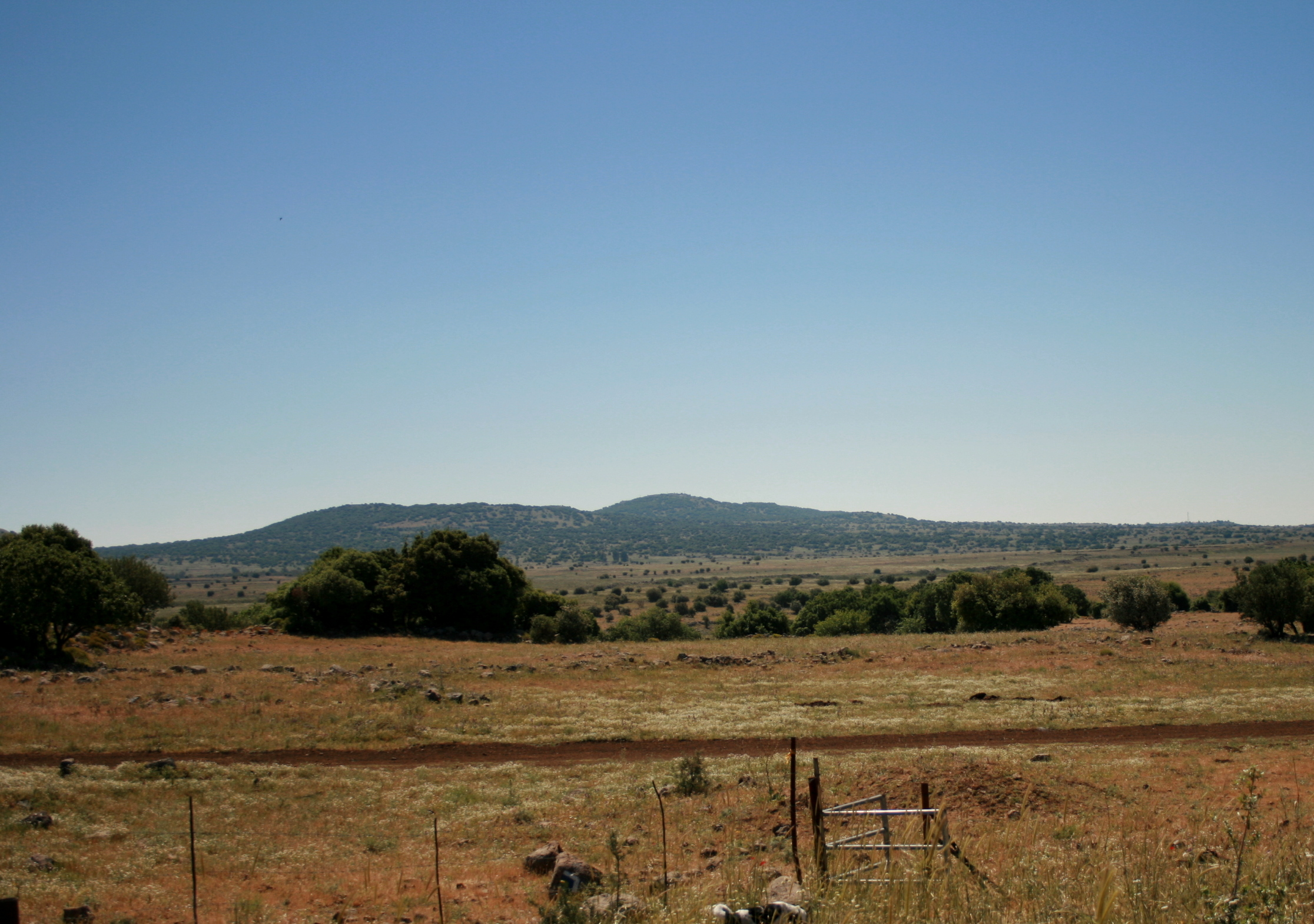 mt. Hoze, Golan heights.